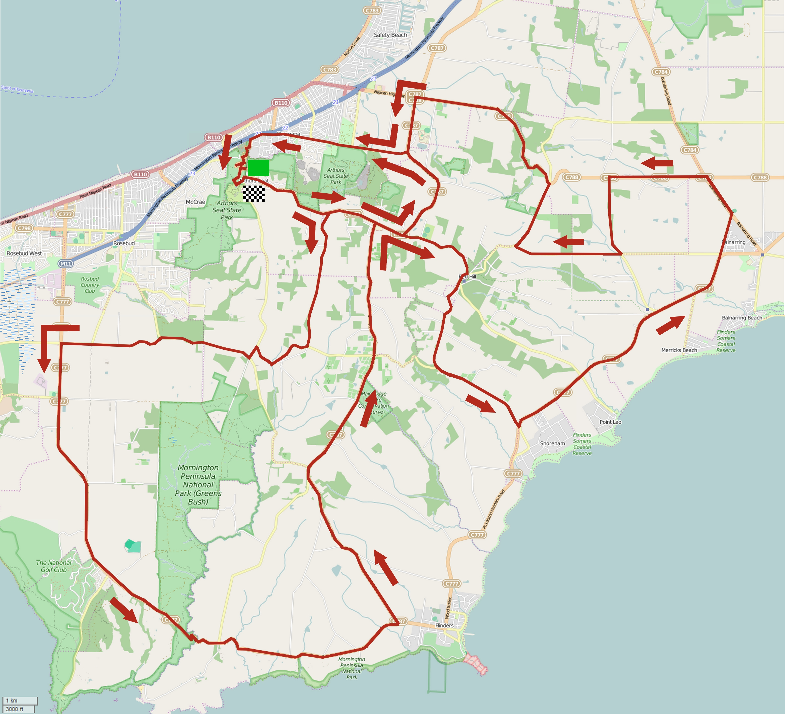 Parcours de la quatrième étape du Herald Sun Tour 2015. This map may be incomplete, and may contain errors. Don't rely solely on it for navigation.